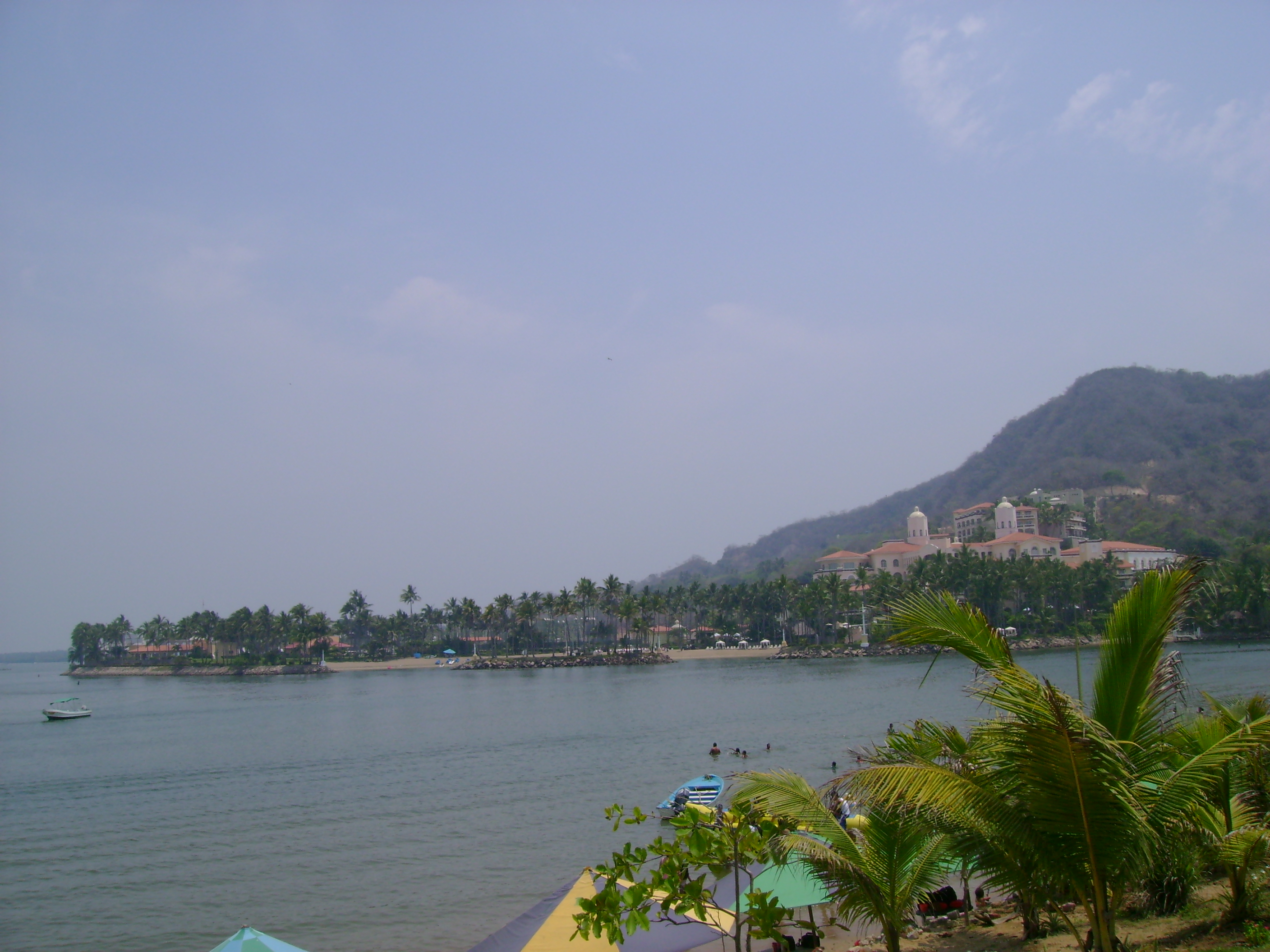 Isla Navidad, Colima, México.